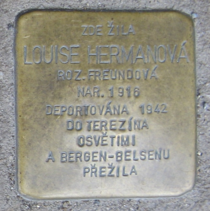 Stolperstein für Louise Hermanova